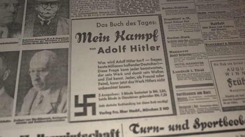 Encart publicitaire paru dans le journal nazi Völkischer Beobachter le 31 janvier 1933. Le texte est le suivant : « Le livre du jour : Mein Kampf d’Adolf Hitler ». « Que va faire Hitler ? se demandent aujourd’hui des millions d’Allemands. Pour le savoir, il suffit de lire son livre. Ainsi vous connaitrez ses buts et sa volonté. Personne, ami ou adversaire, ne peut plus rester indifférent à ce livre »